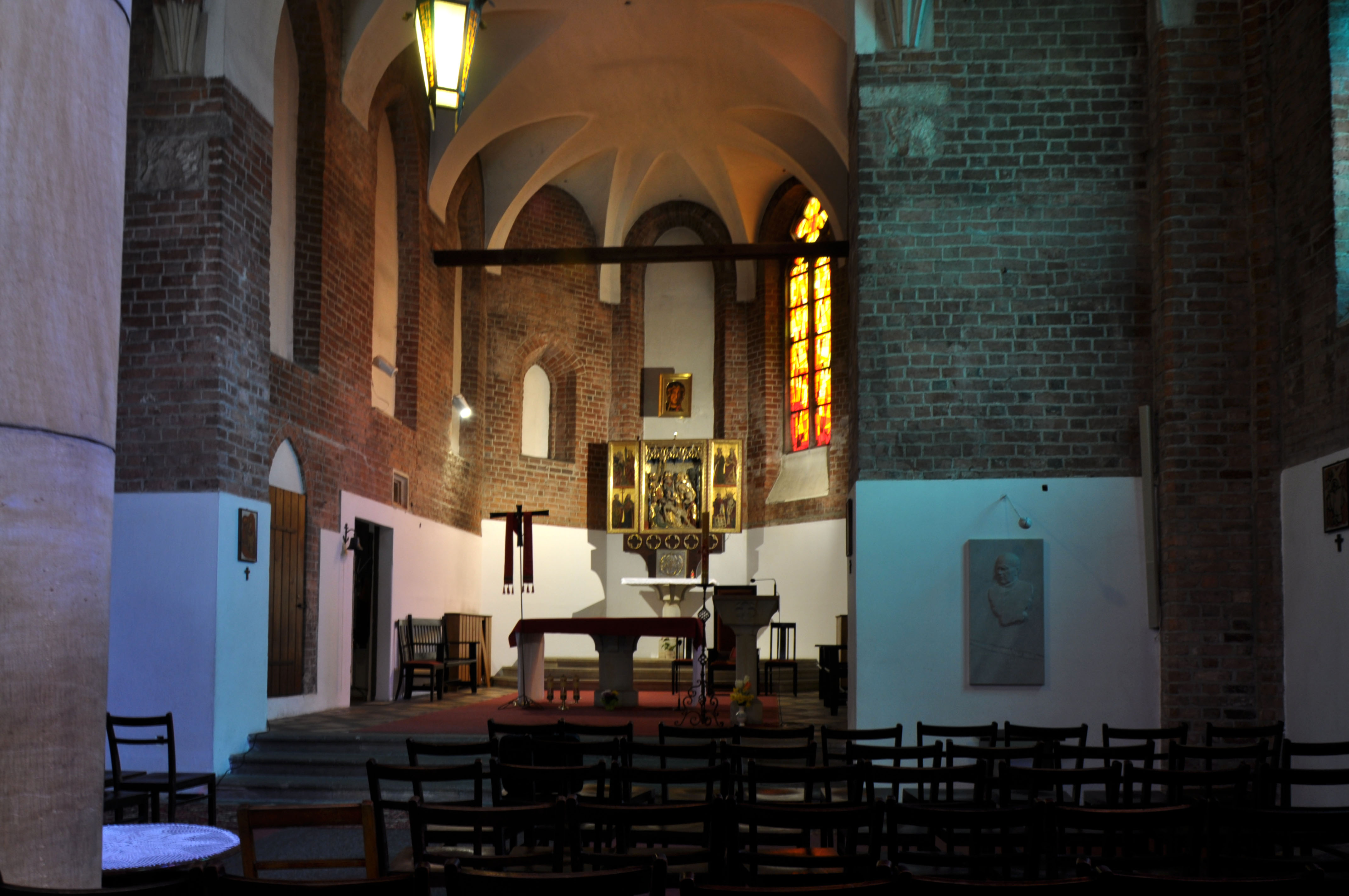 Wrocław, kościół p.w. śś. Piotra i Pawła, XV, XX